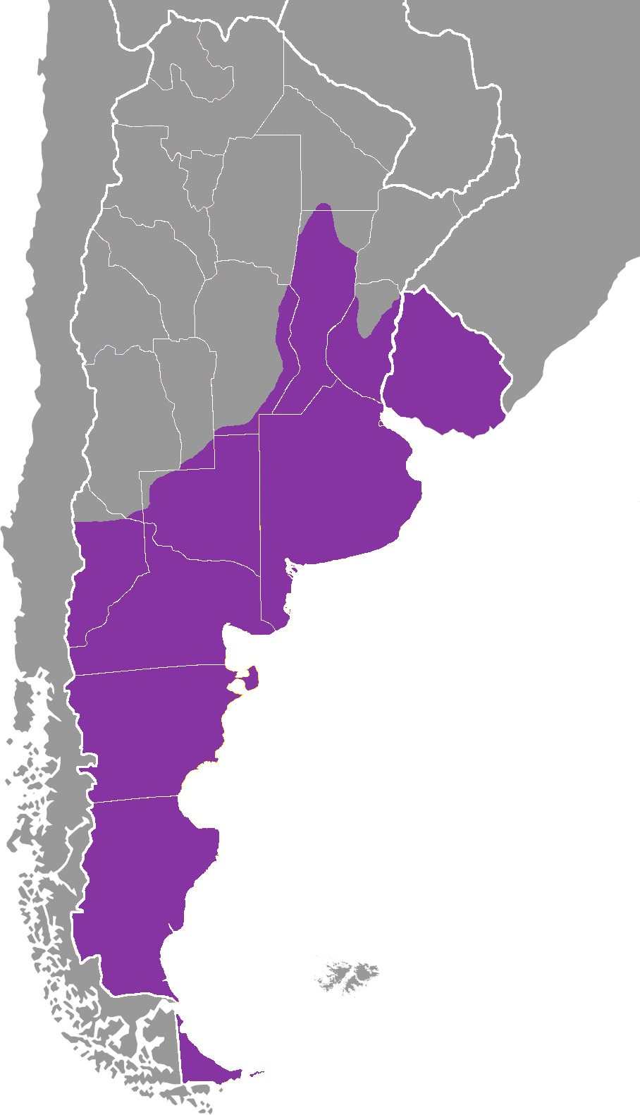 Extención del dialecto rioplatense del idioma español